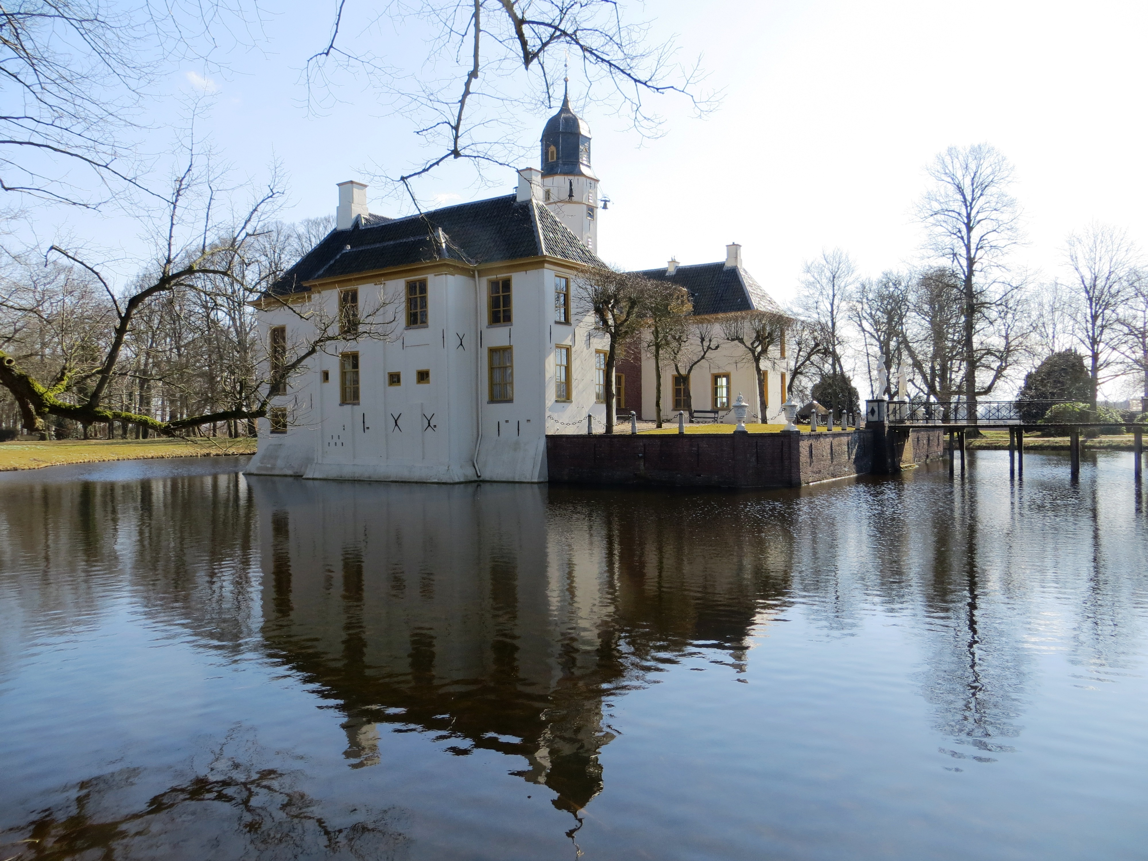 Fraeylemaborg - Slochteren